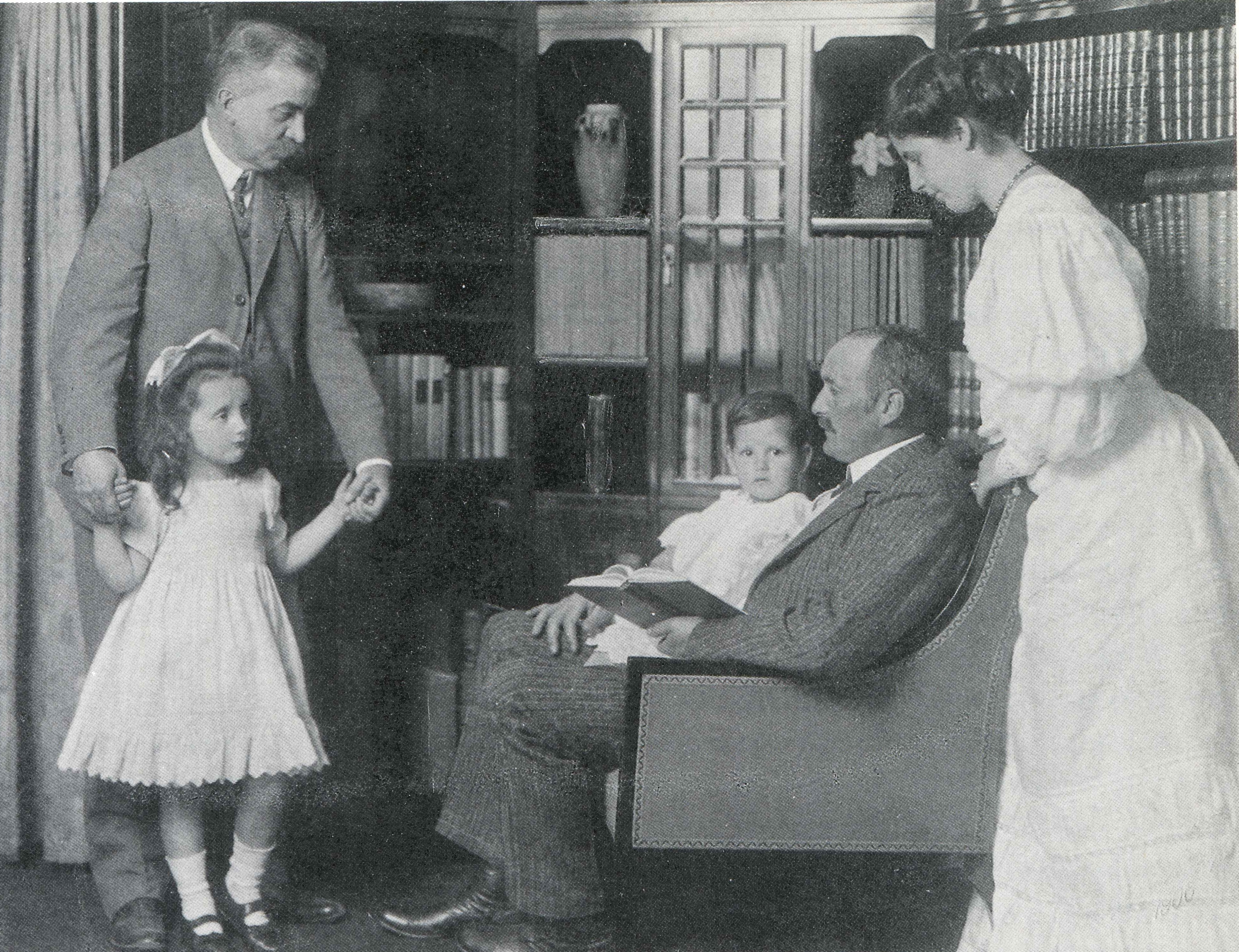 Ernst Juhl (links) mit der Familie seiner Tochter Hertha Terfloth